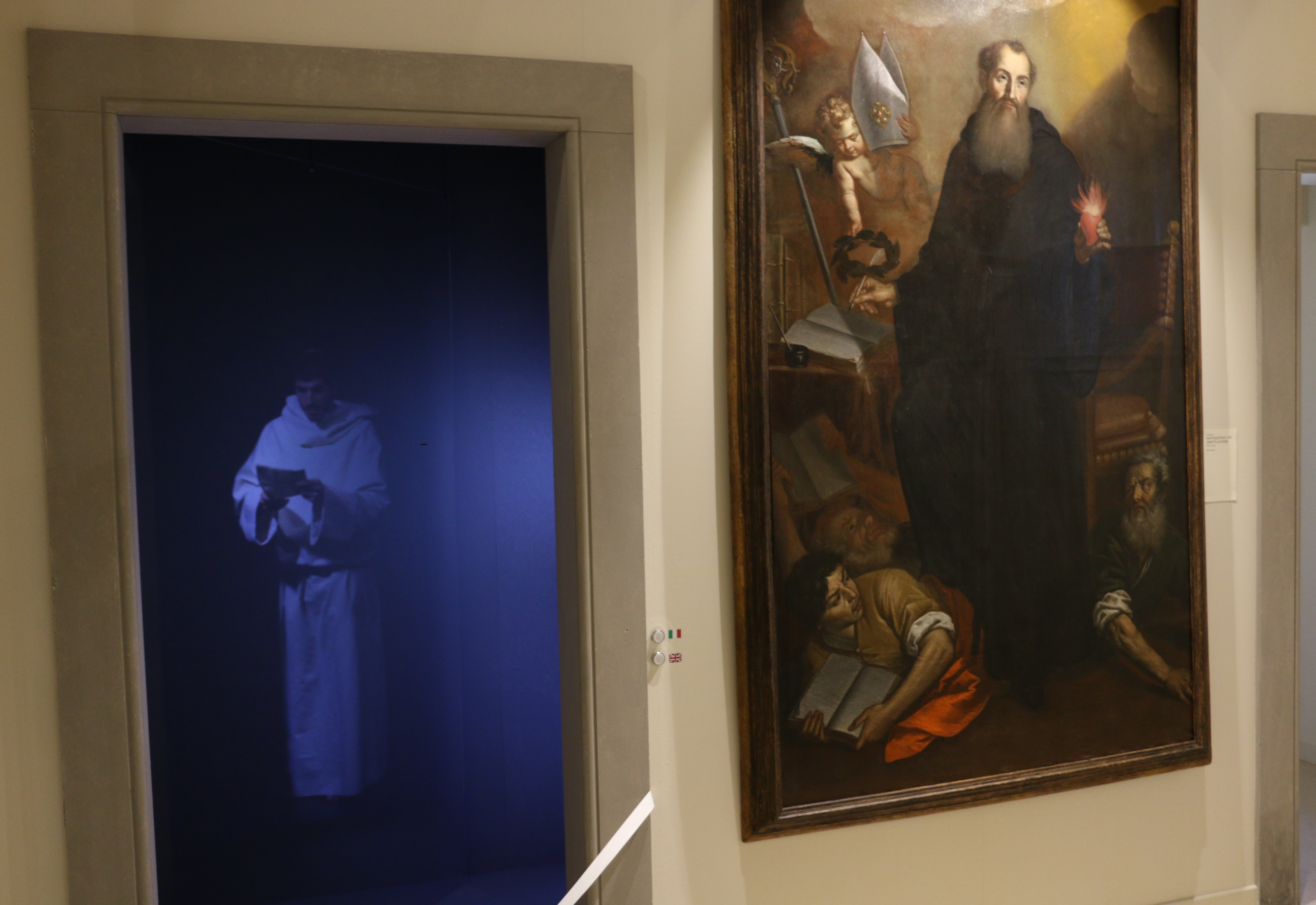 MAST Castel Goffredo-La Riforma Protestante